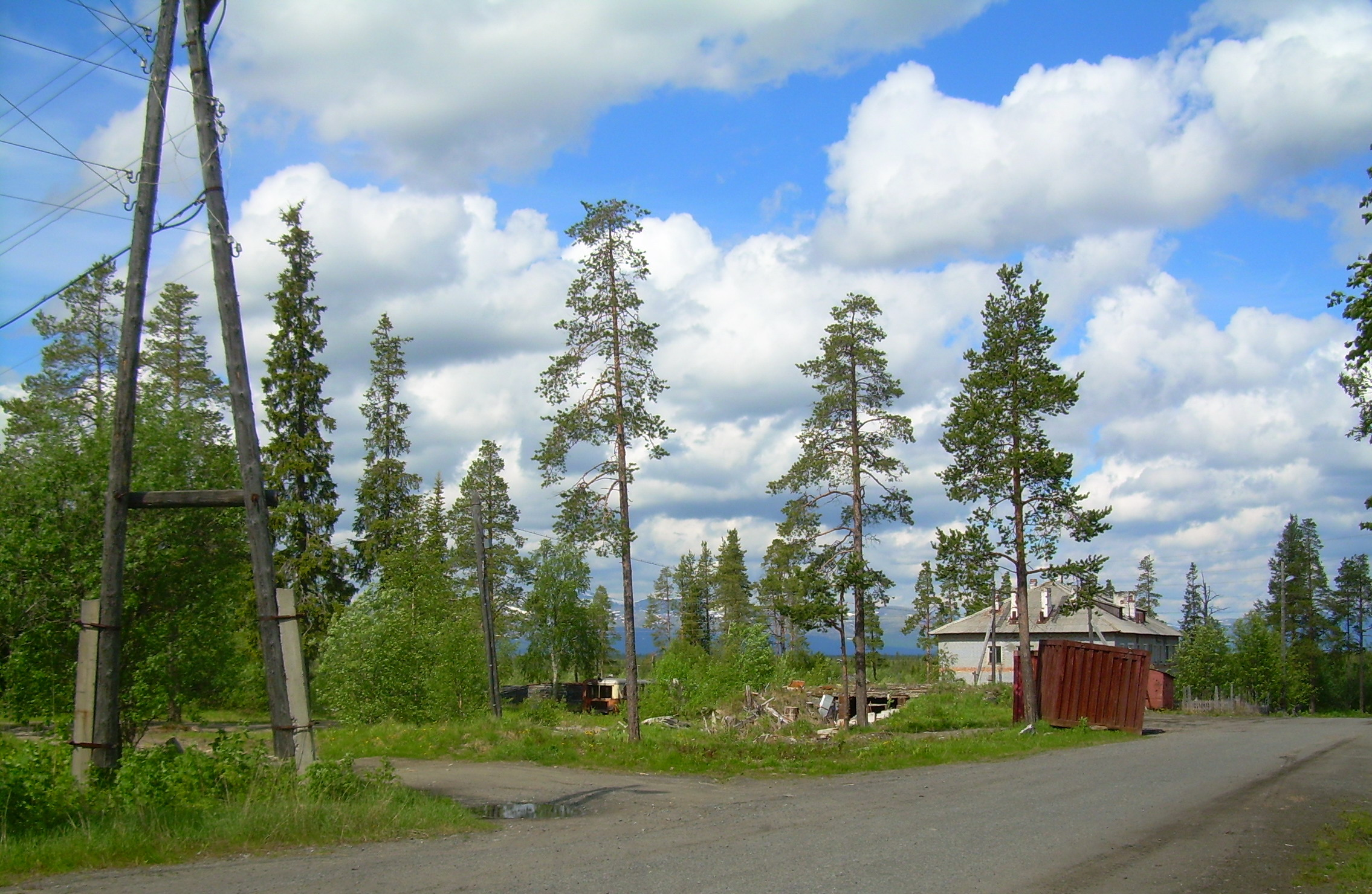 Октябрьский, Мурманская область